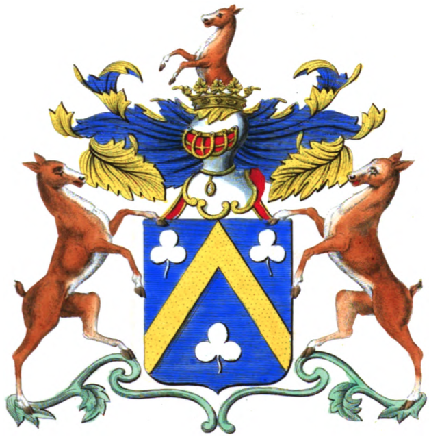 Armoiries de la famille de Biseau